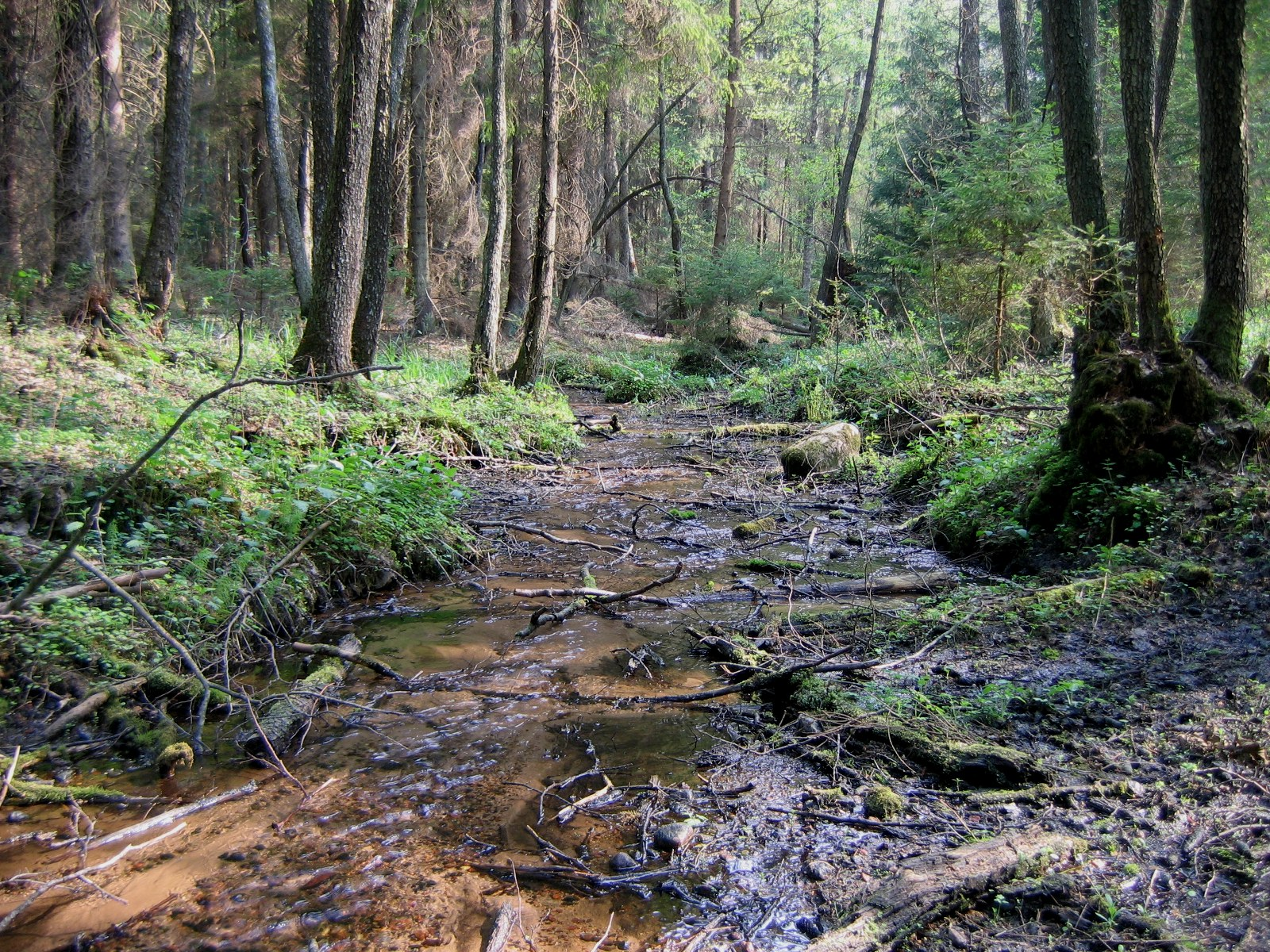 Autoriaus nuotrauka, 2006.05.13. Šaltiniai Varėnės slėnio šlaituose- vietovė vadinama „Giraite“, Trilūšio sala. Nuotrauka gali būti platinama pagal GFDL licenciją.